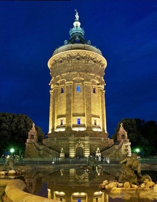 Wasserturm (water tower) in Mannheim, Germany